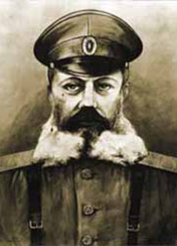 Генерал-майор Михаил Владимирович Шидловский.